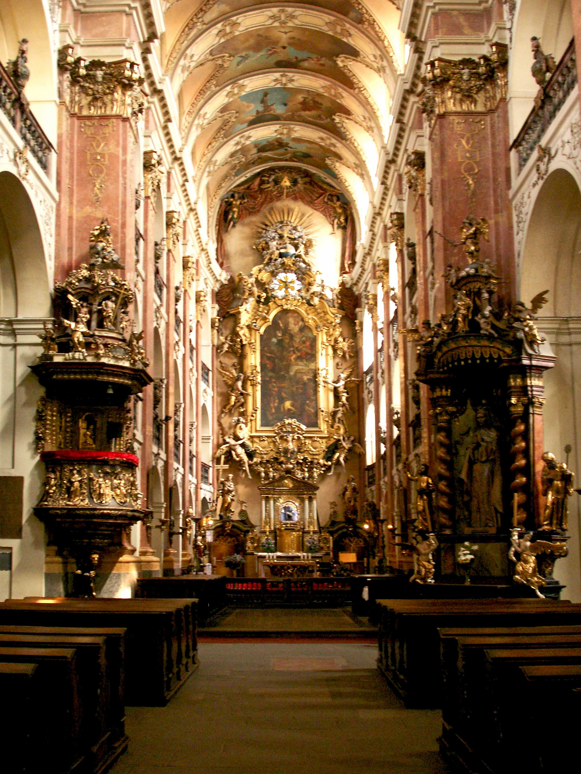 Loď Sv. Jakuba